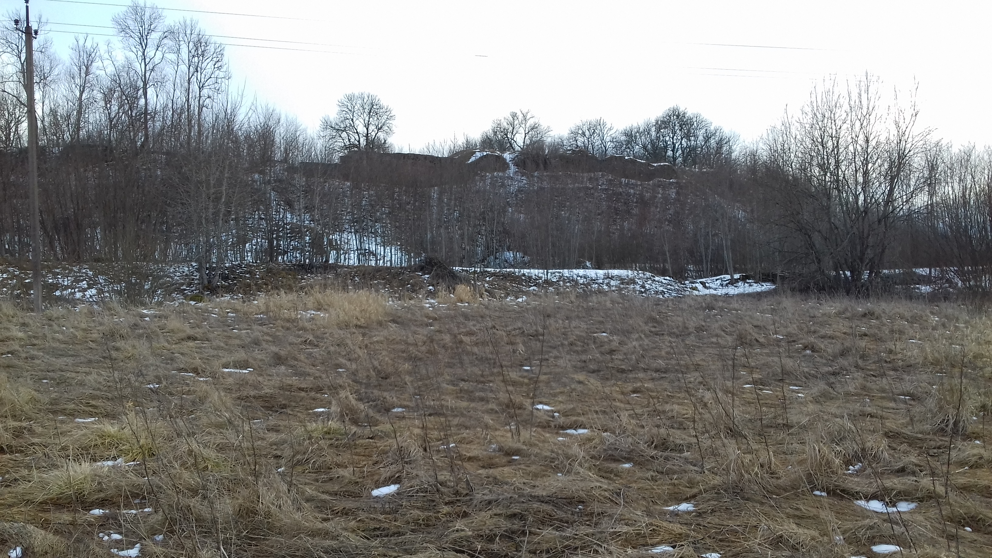 Vaade karjamaalt